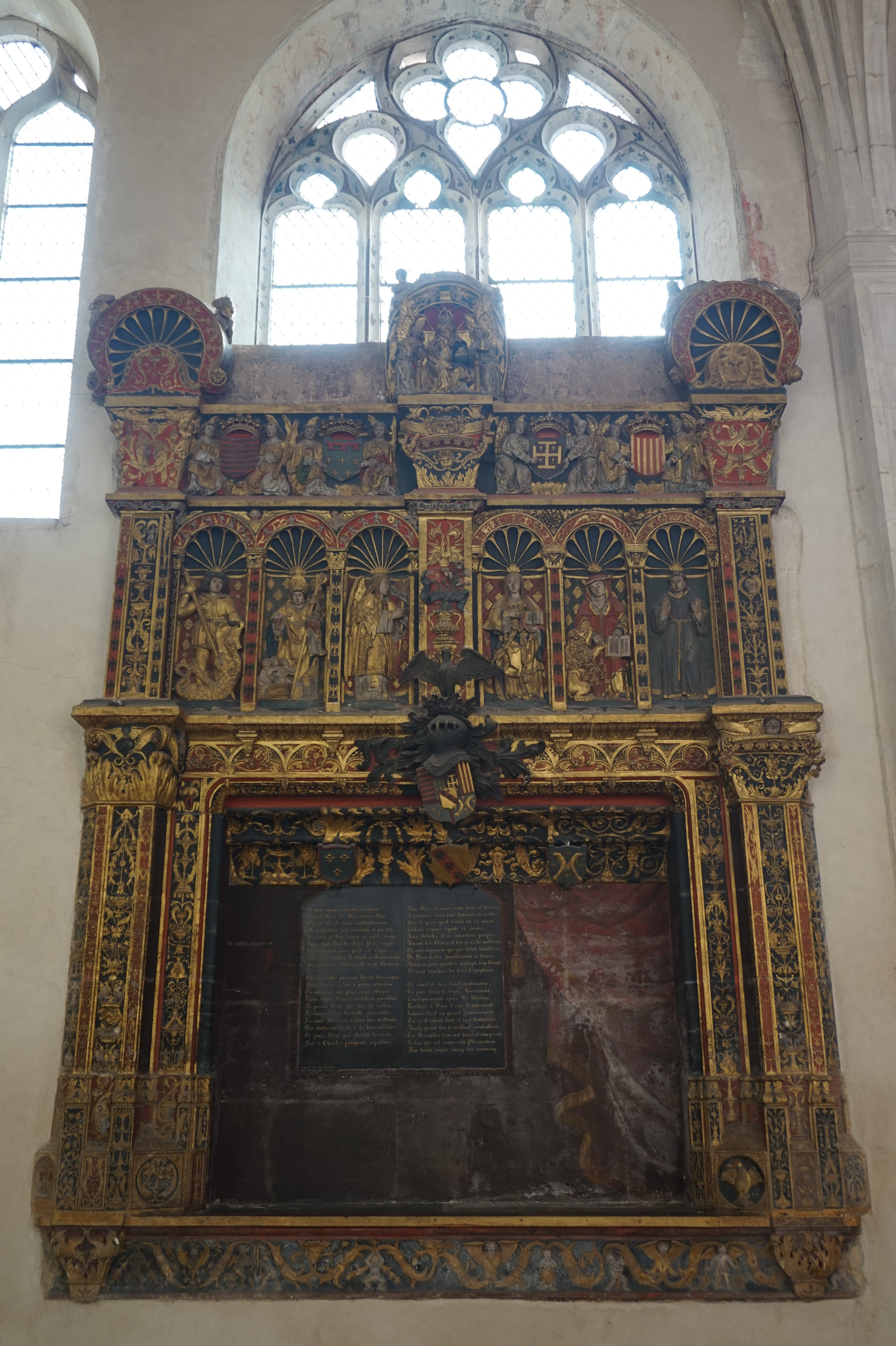 Nancy, chapelle des Cordeliers, enfeu de René II, duc de Lorraine. 1511. Attribué à Mansuy Gauvain.